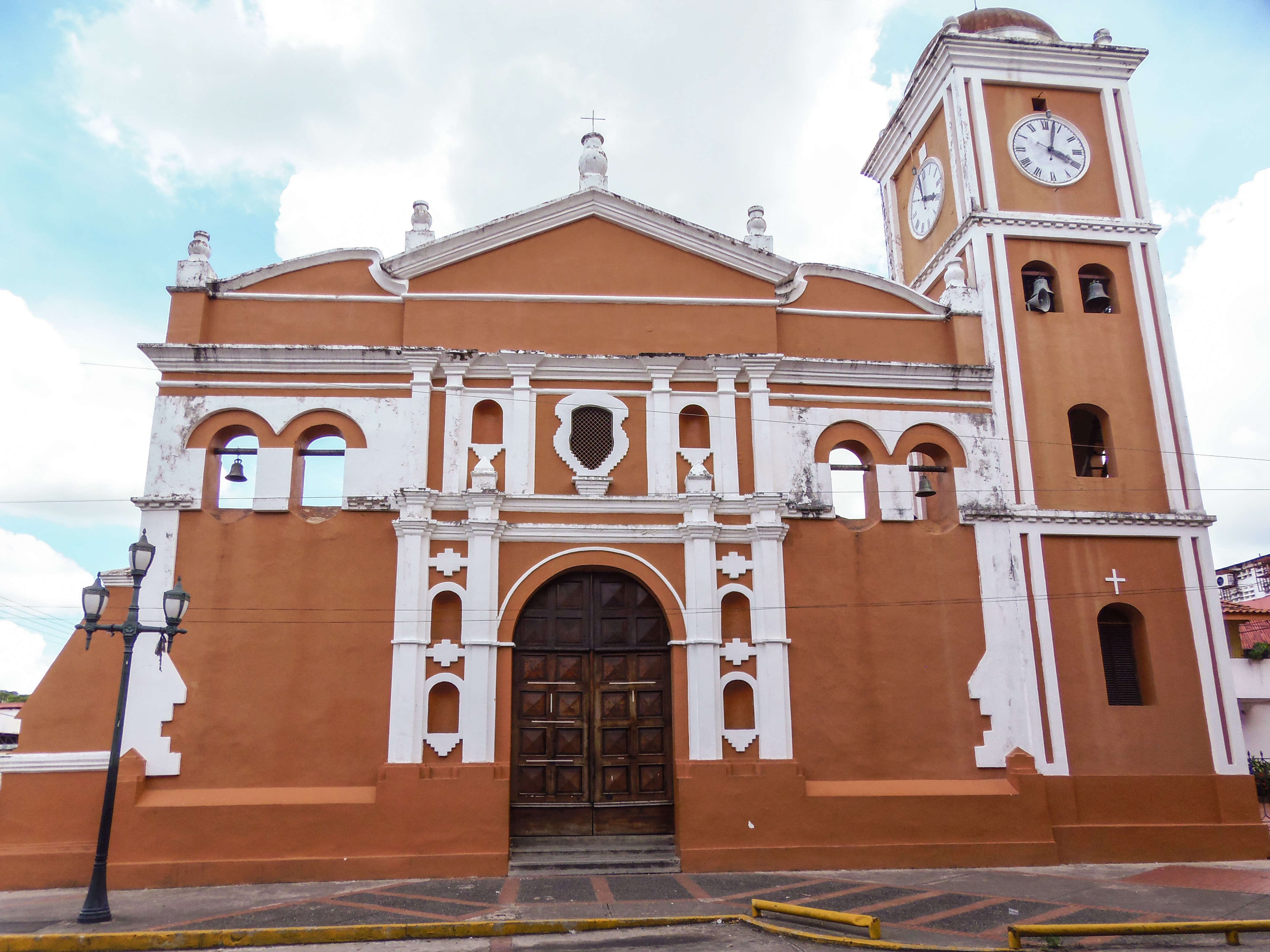 Catedral Nuestra Señora del Pilar